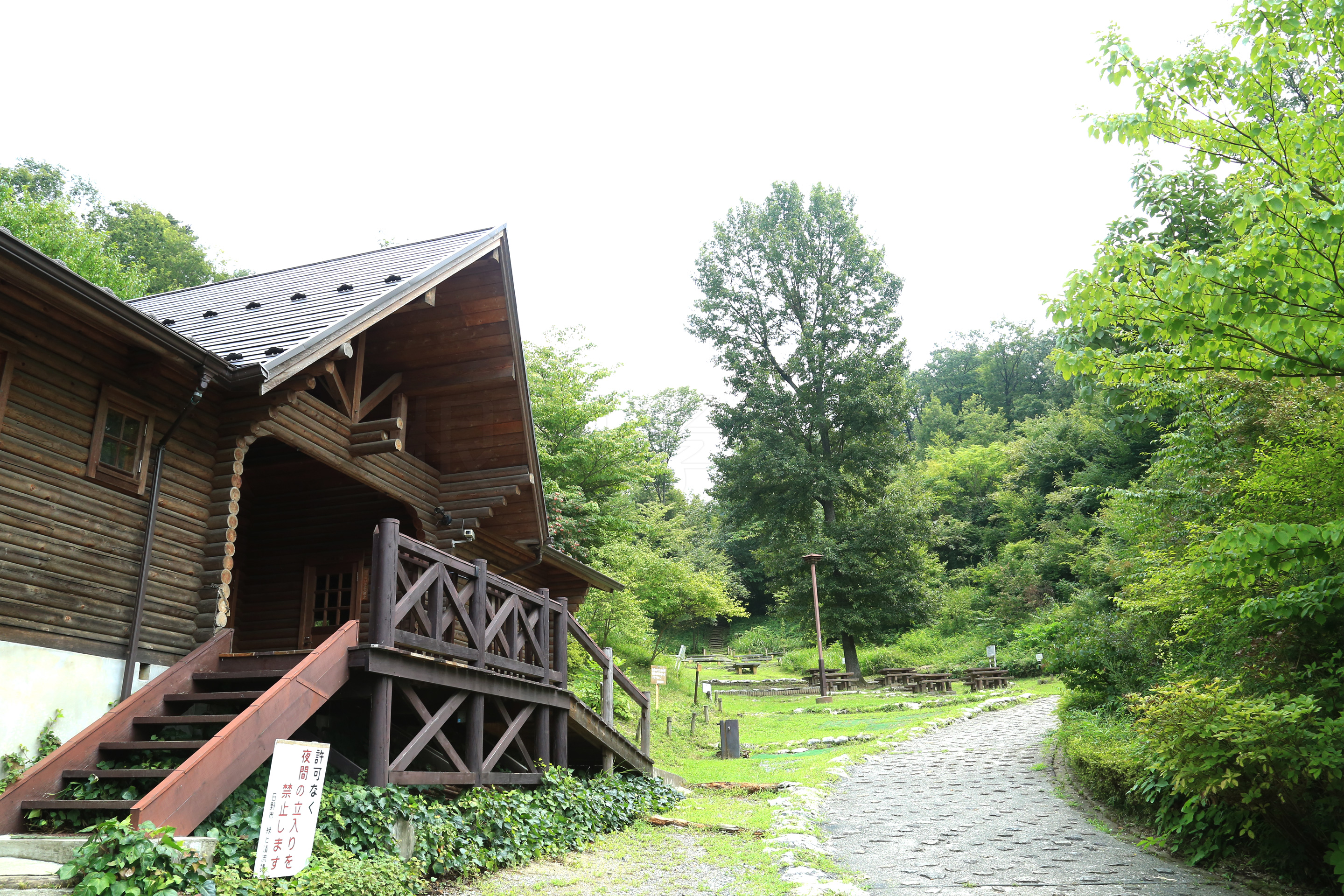 日野市ja:南平 (日野市)にある南平丘陵公園の管理室付近。